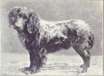 Wachtelhund from 1915